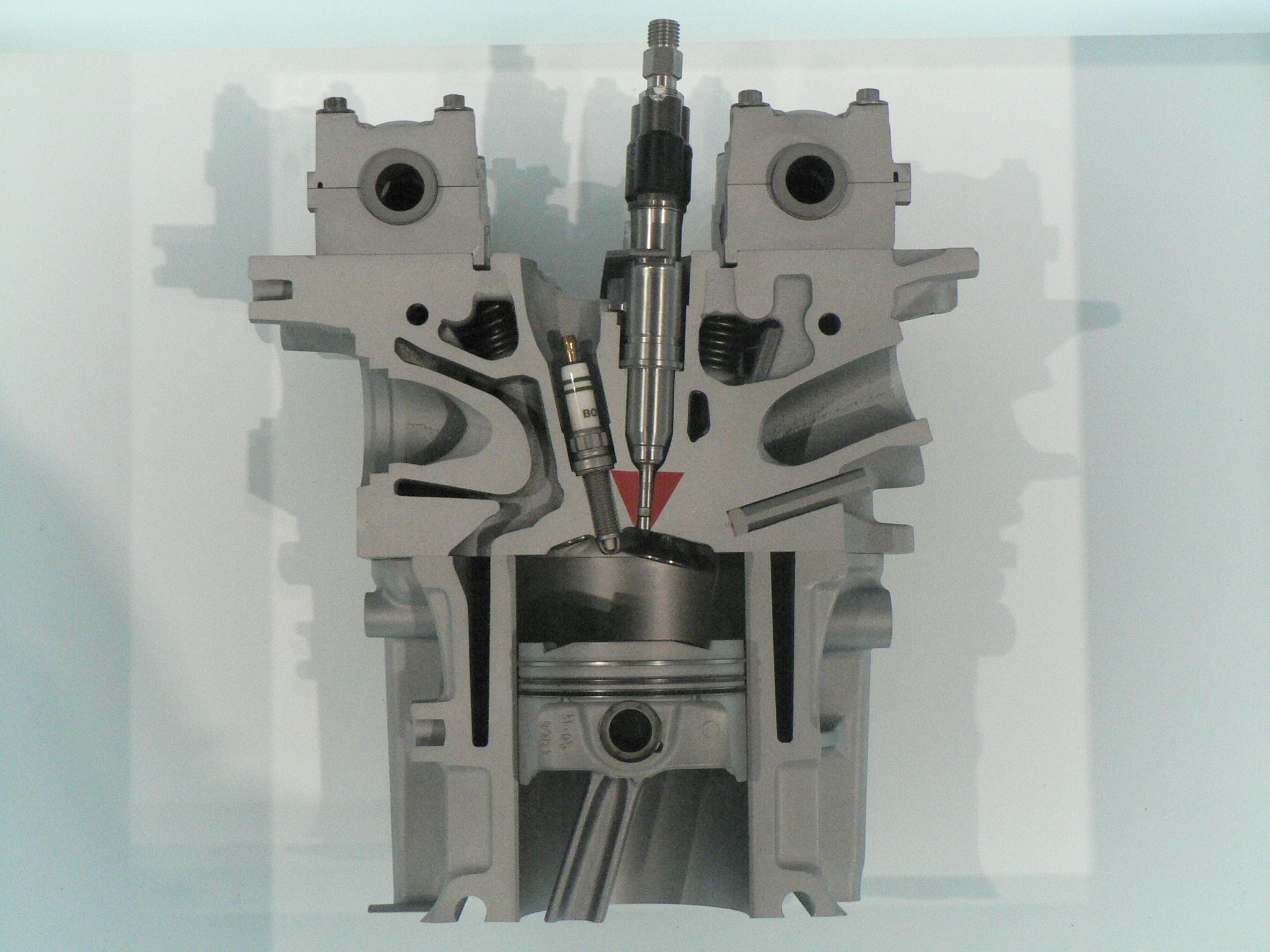 Mondial de l'automobile, Paris 2006